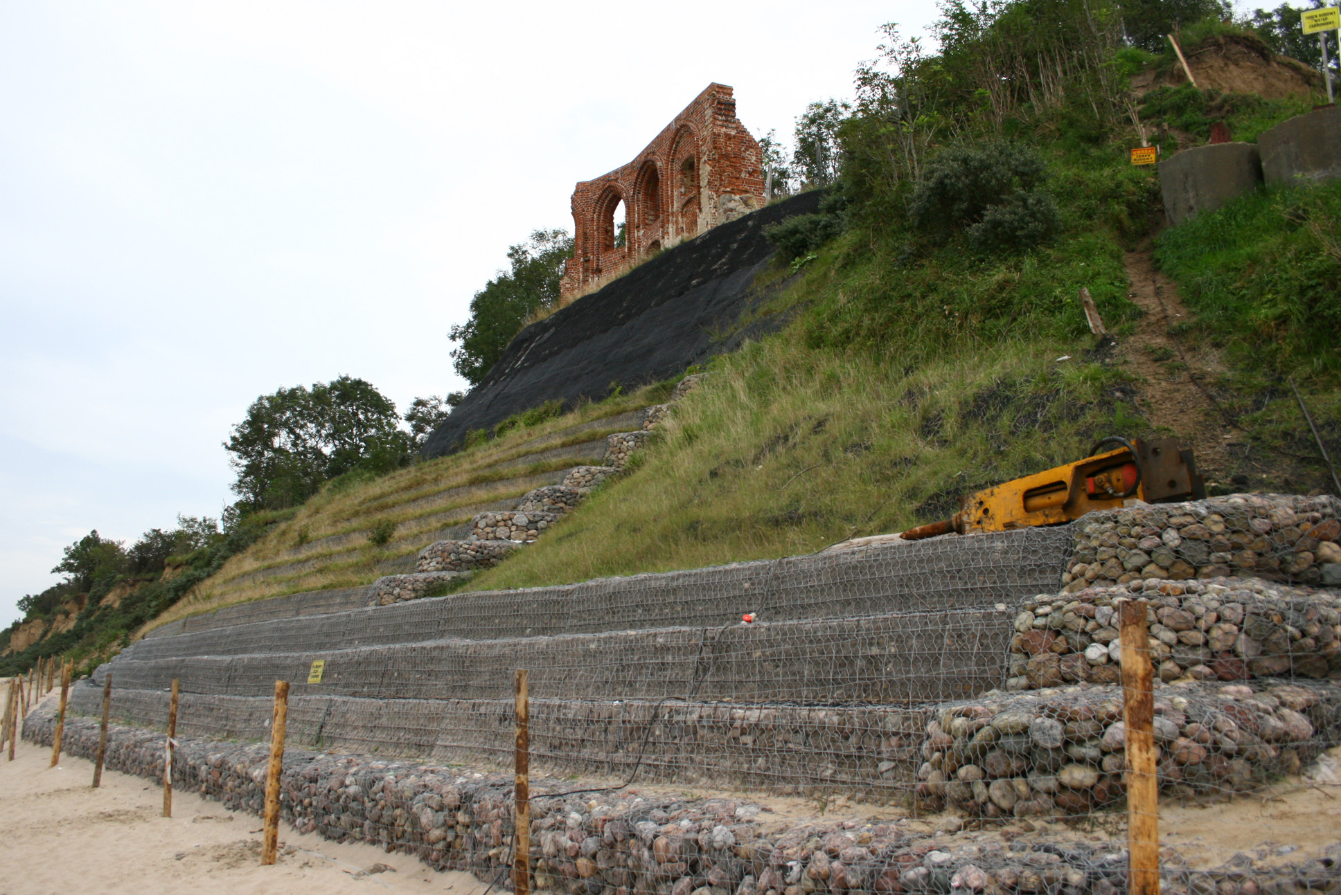 Ruiny kościoła w Trzęsaczu - zabezpiecznie